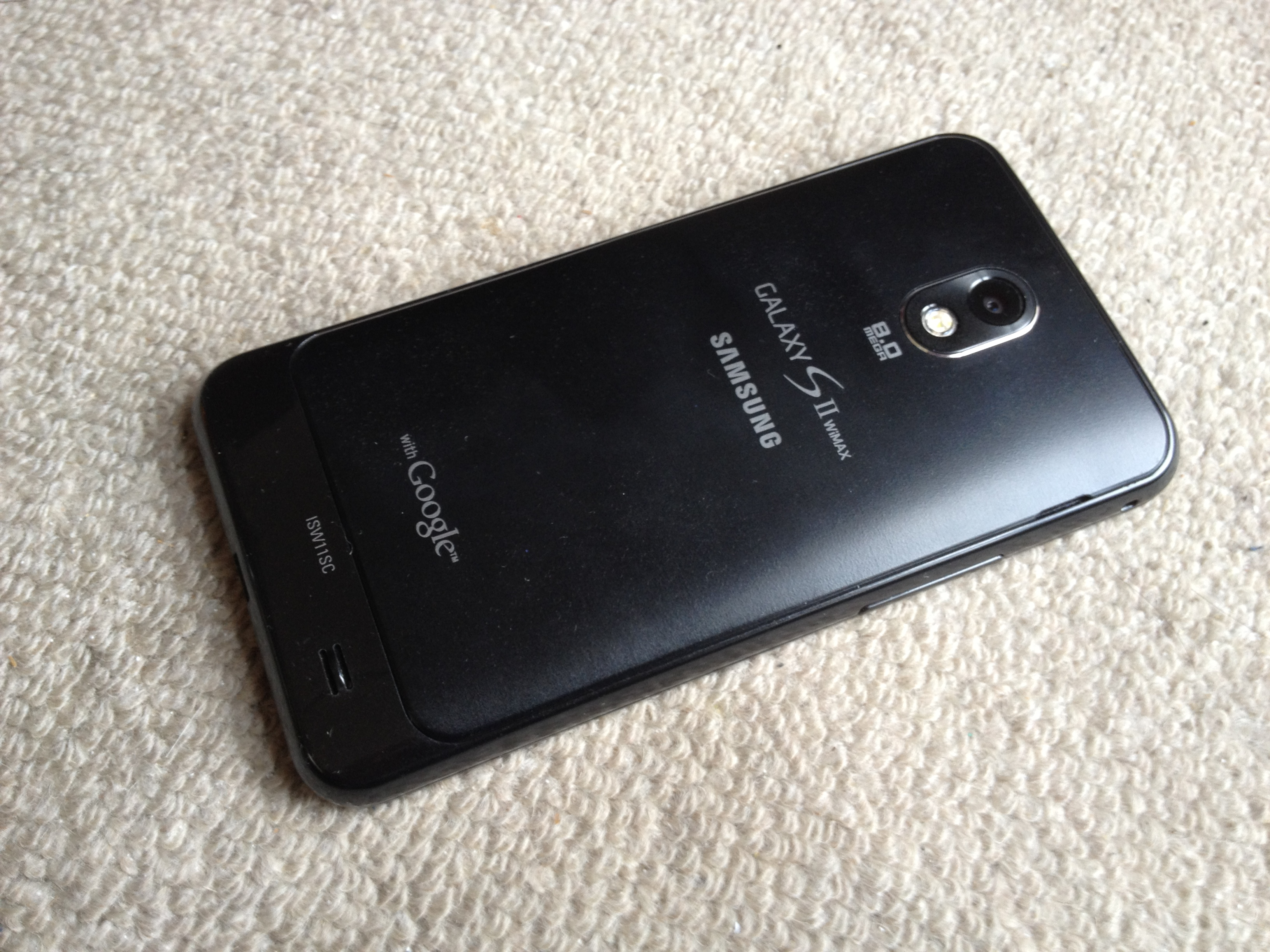 ISW11SC 背面